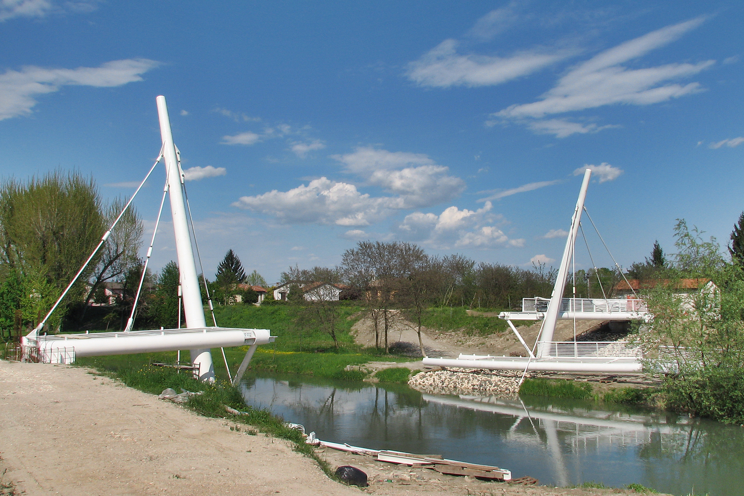 Il canale Brentella all'altezza della costruenda passerella pedonale della Pelosa.